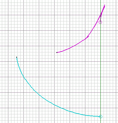 Vergrößerter Verlauf der Ortskurven von B und M für Krängungswinkel von 0° bis 85° mit Markierungen für das Anfangsmetazentrum und B in Ruhelage